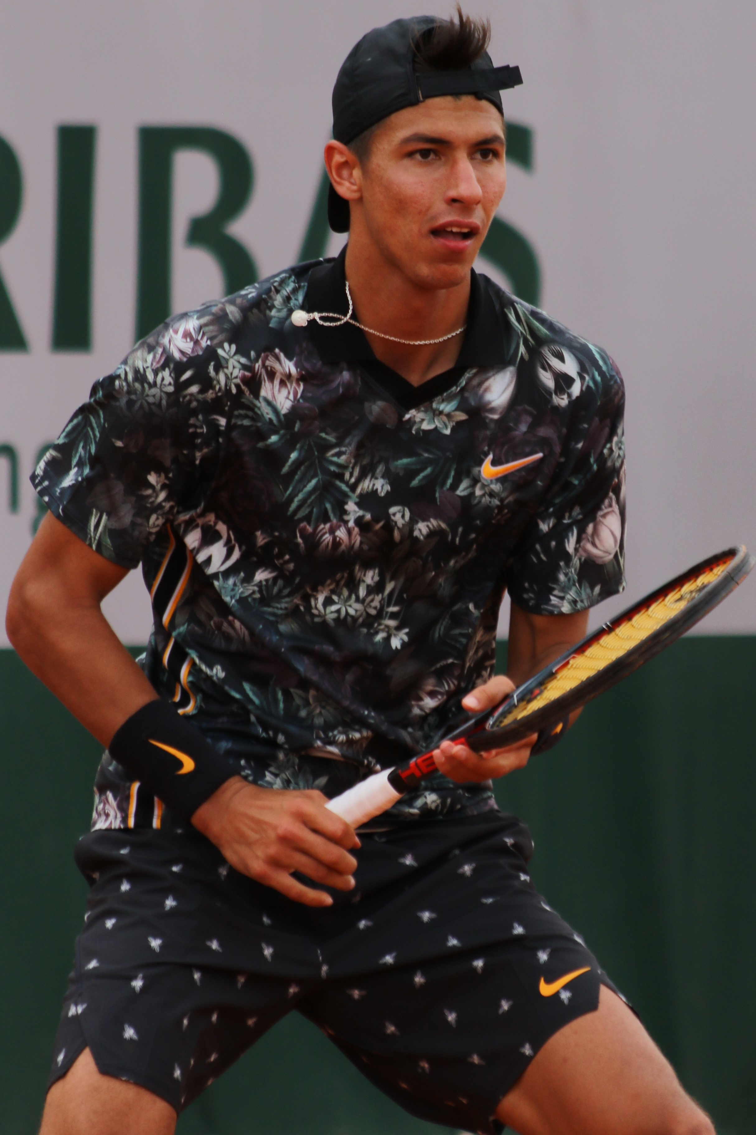 Popyrin RG19 (46)